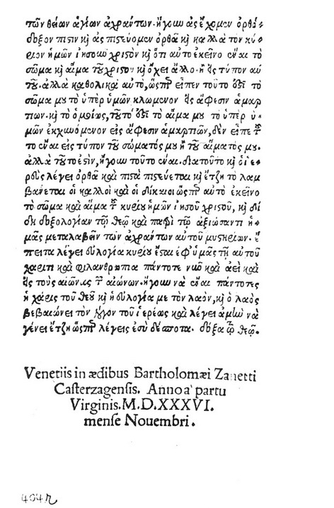 Η δεύτερη σελίδα του βιβλίου Η Παλαιά τε και Νέα Διαθήκη, του Ιοαννίκιου Καρτάνου. Το 404 είναι ο αριθμός των σελίδων του βιβλίου. Η σημείωση στο κάτω μέρος είναι οι πληροφορίες έκδοσης του βιβλίου. Δημιουργοί: Ιωαννίκιος Καρτάνος & Bartholomaei Zanetti Τοποθεσία: Εκδόθηκε στην Βενετία, Ιταλία Άλλες πληροφορίες Εκδότης: Bartholomaei Zanetti Τρέχουσα τοποθεσία: MO0089 Biblioteca Estense Universitaria - Modena Βιβλιογραφικός αριθμός αναγνώρισης: CNCE 53086